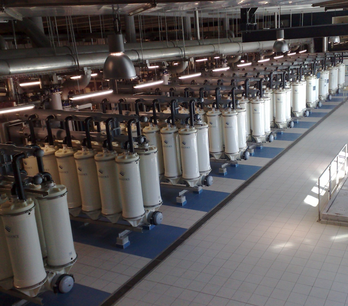 Unités d'ultra-filtration pour le traitement de potabilisation de l'eau dans le hall de traitement d'une usine française